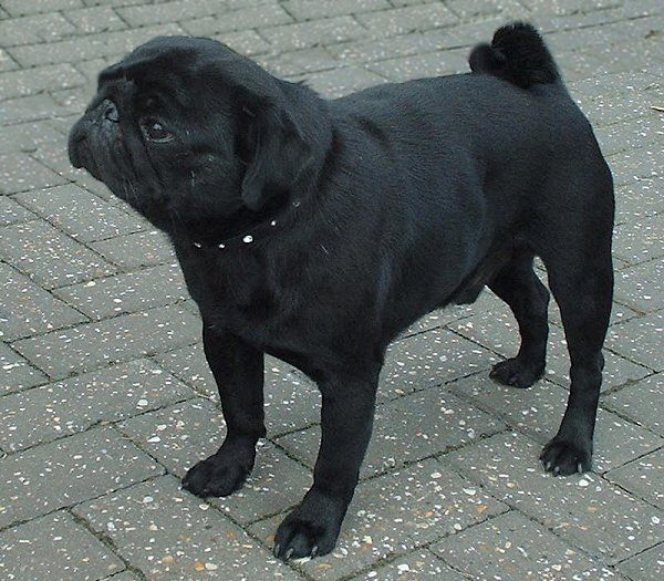 sannse